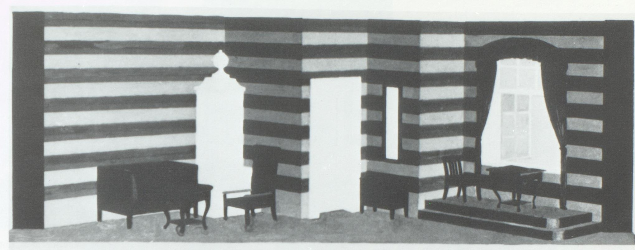 Ewald Dülberg Bühnenbildentwurf zu Igor Strawinsky Mavra Krolloper 1928